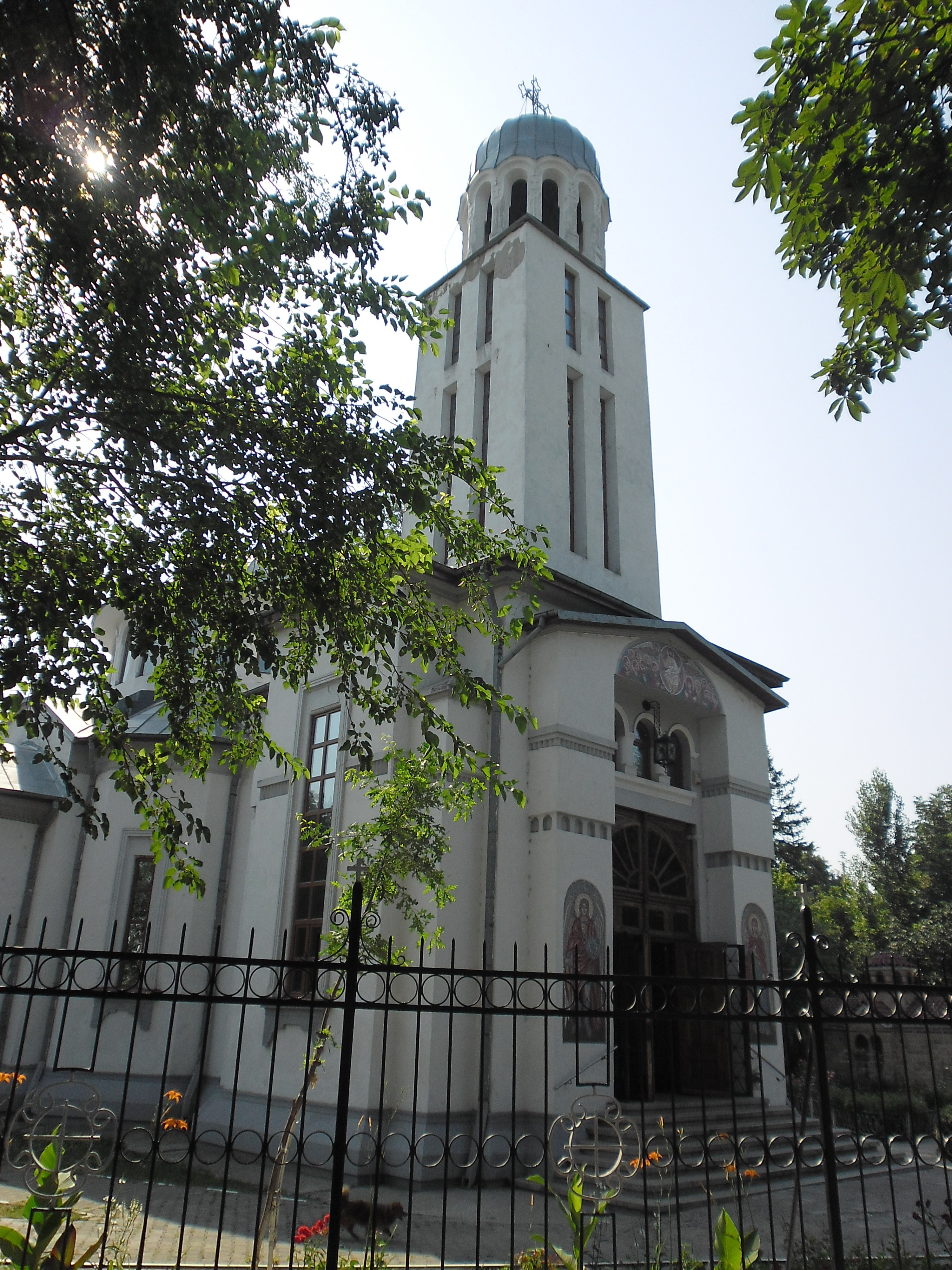 Biserica "Înălțarea Domnului"-a Eroilor 01